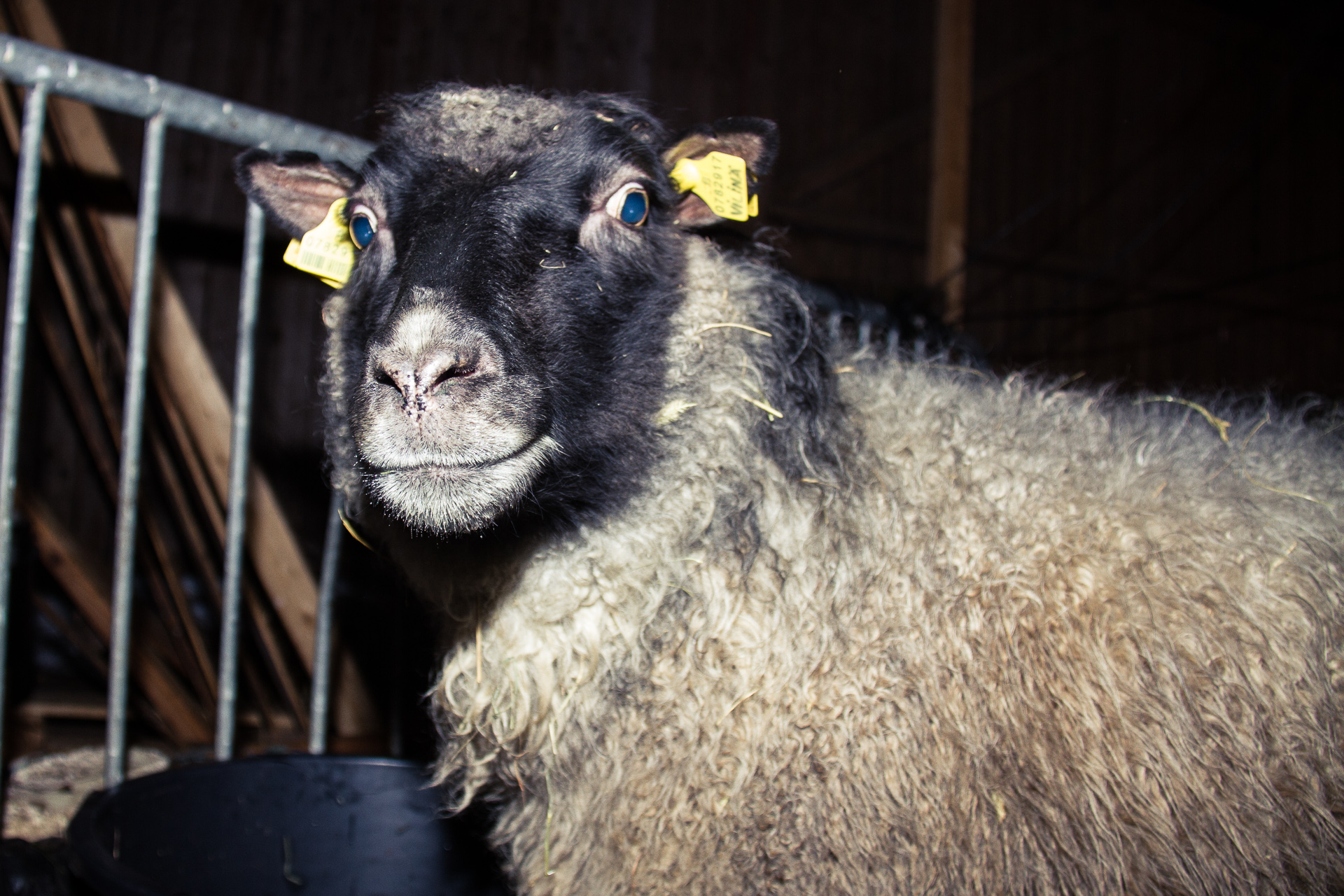 Kainuunharmas-rotuinen lammas Ruusa Yli-Iissä